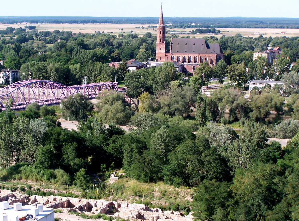 Miejsce po niezachowanym kościele franciszkanów w Głogowie